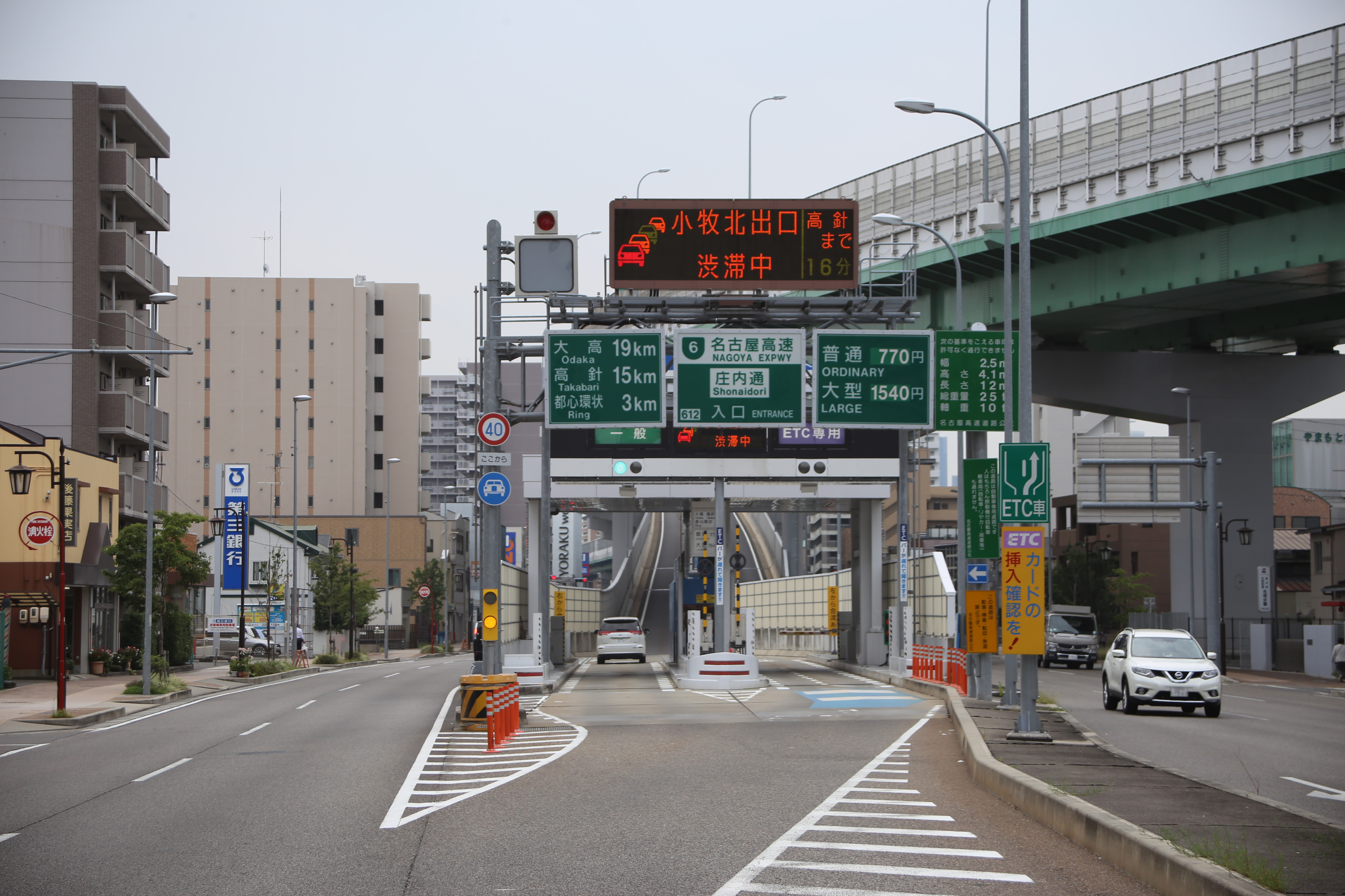 名古屋市西区庄内通の名古屋高速6号清須線庄内通出入口